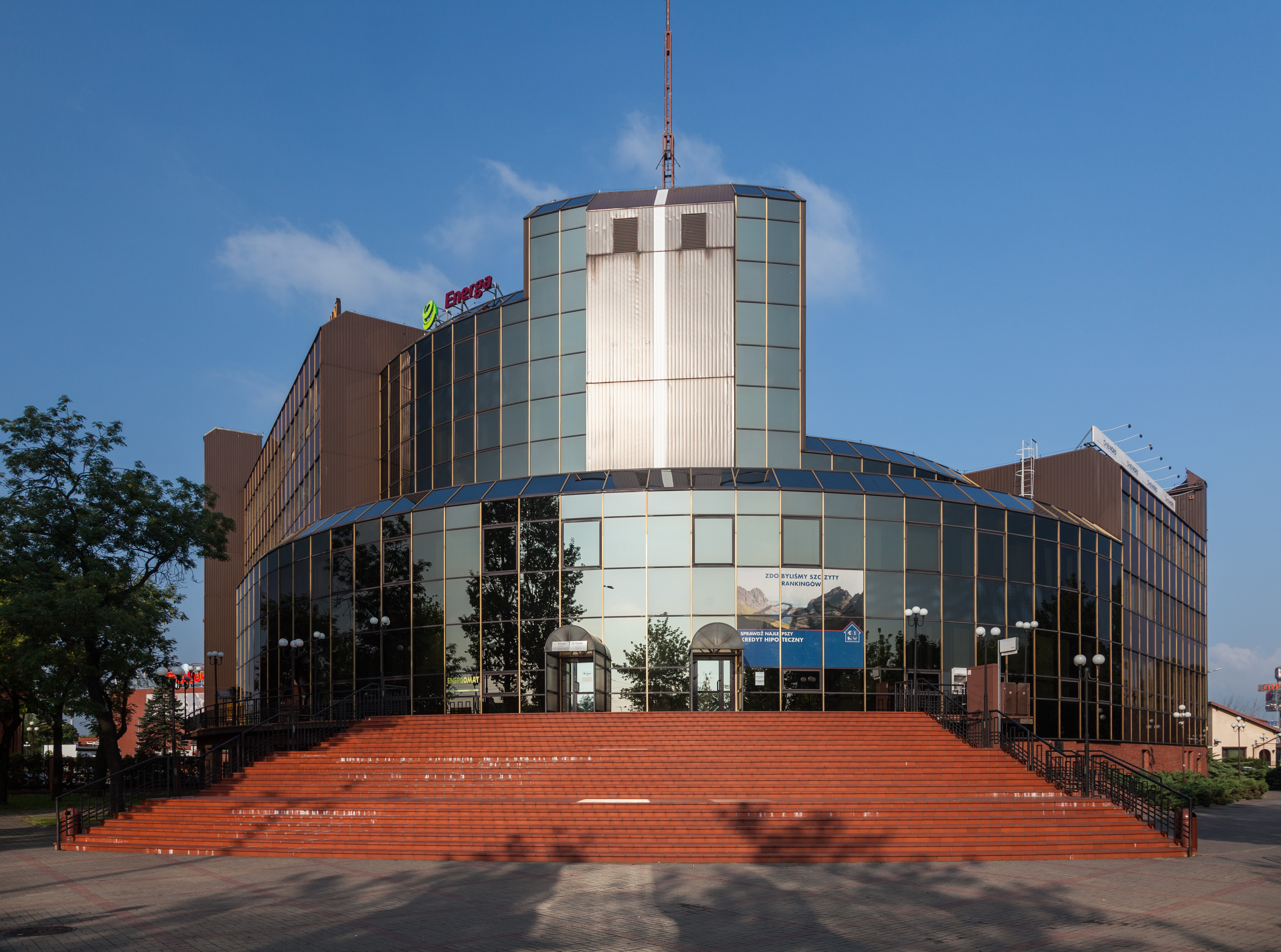 Dawny bank energetyki w Toruniu.